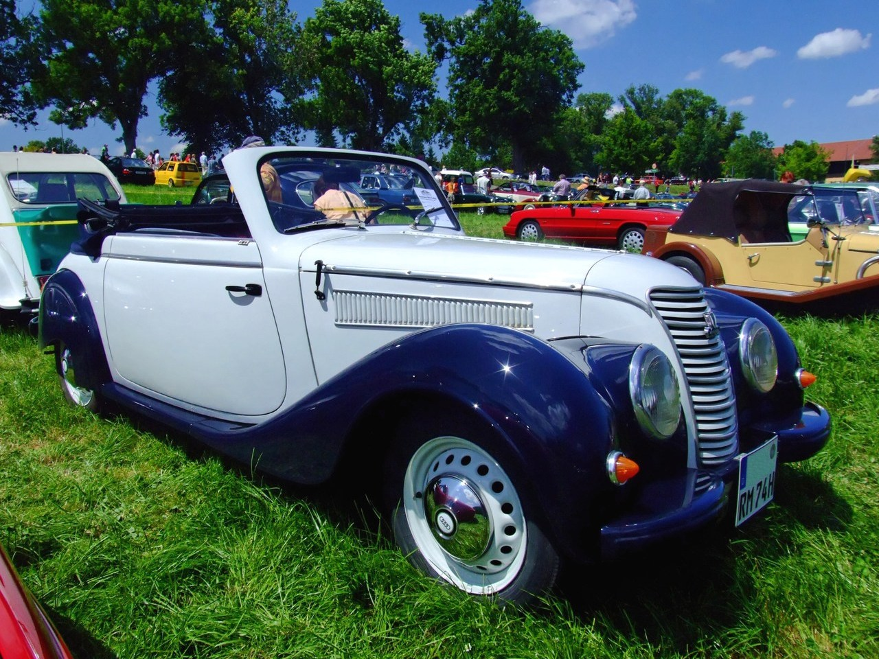 Quelle: selbst fotografiert, 06/2007 Fotograf: Späth Chr.